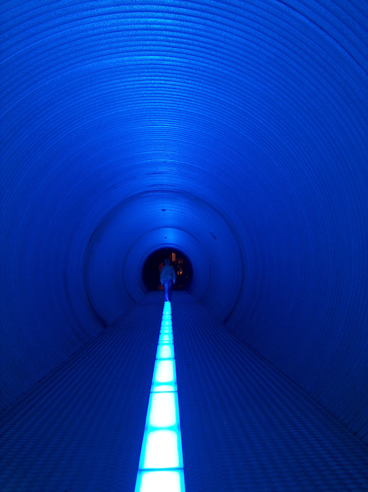 A person in a long tunnel at a science museum